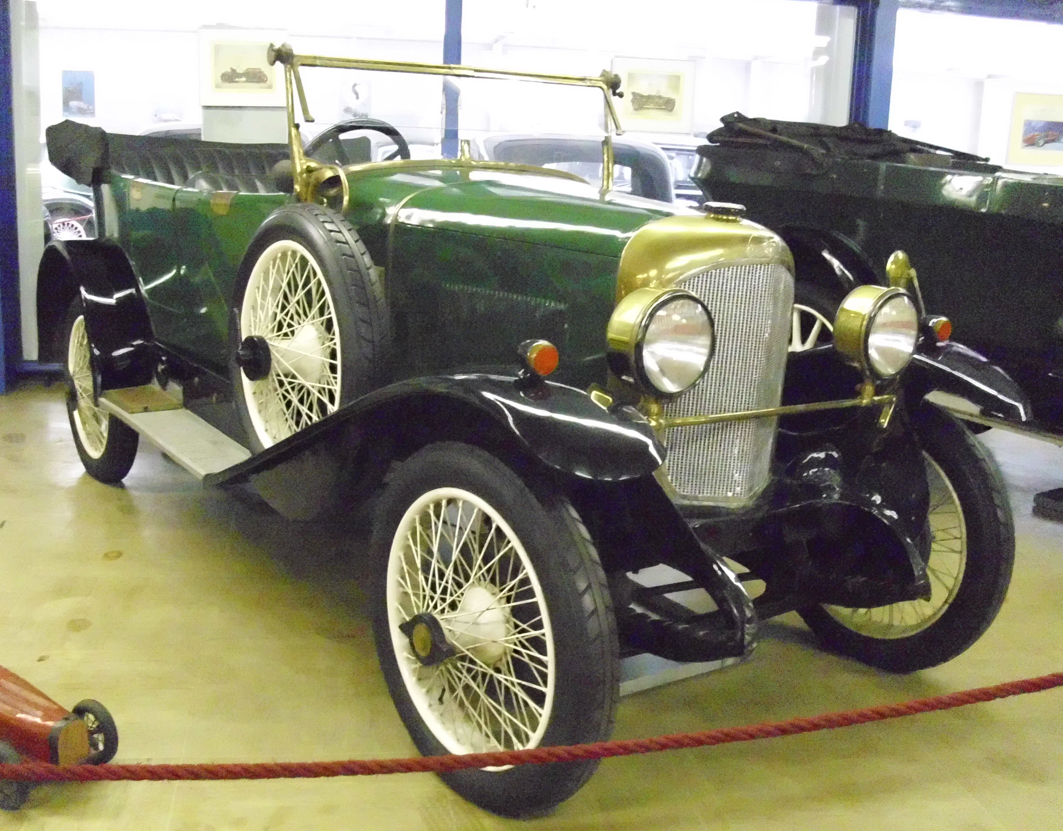 Austro-Fiat 9/32 PS 1923 im Oldtimer-Museum Kröpfl